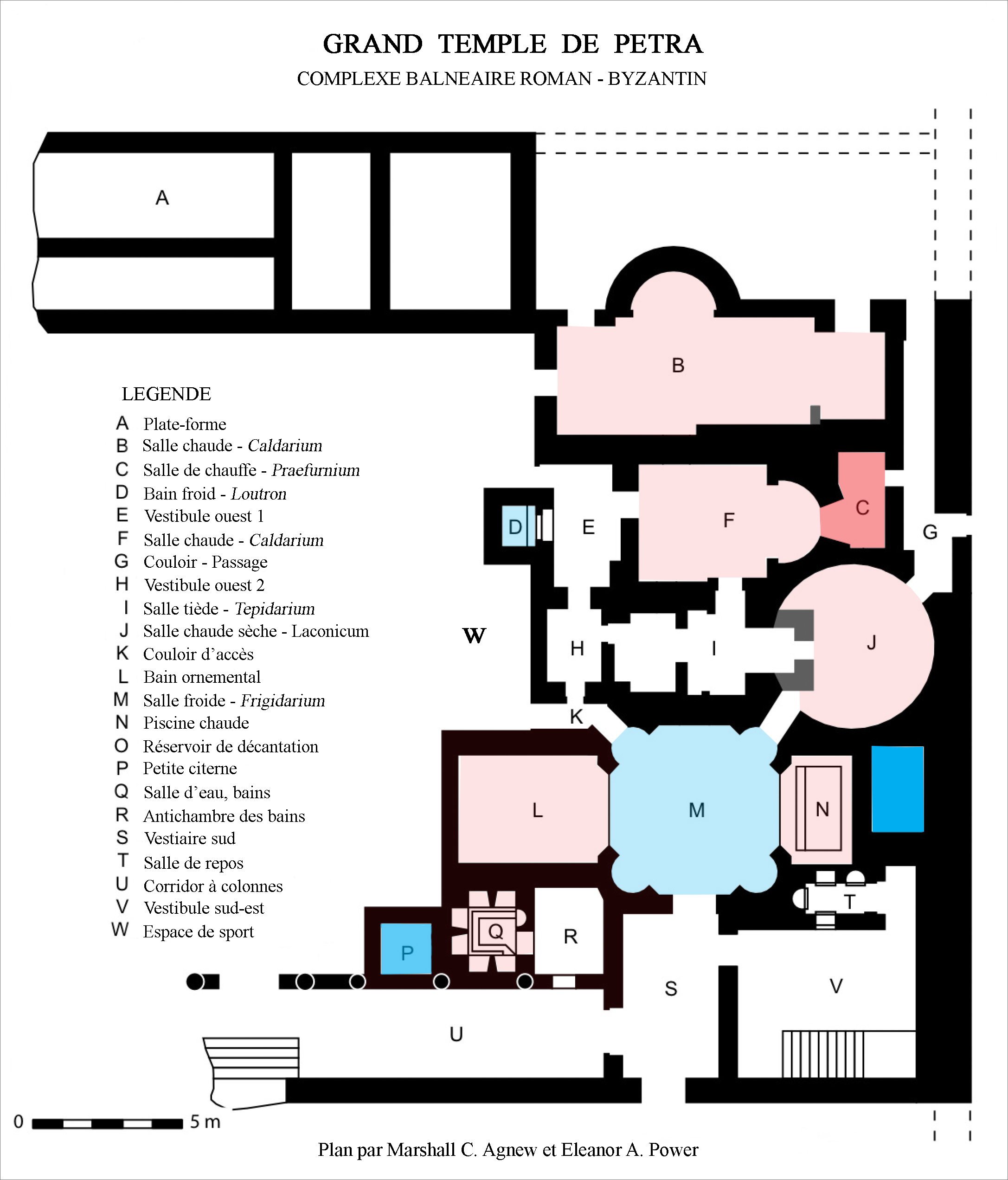 Plan des thermes du Grand Temple roman-byzantin de Pétra.